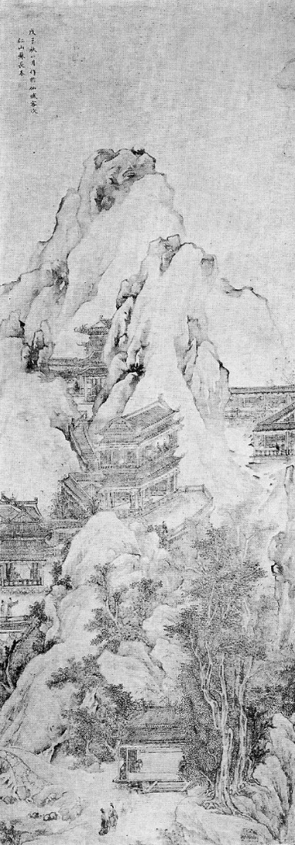 Paysage avec architecture. Soie, légers rehauts de couleurs, 123x43cm. Daté de l'automne 1828, exécuté à Canton, signé. Sceaux: a: rouge bipartite rouge-blanc; blanc; c: blanc (unique occurrence). Importante peinture . Représente les débuts artistiques de Su Renshan à ses quinze ans. Démontre son étonnante maîtrise des techniques traditionnelles.